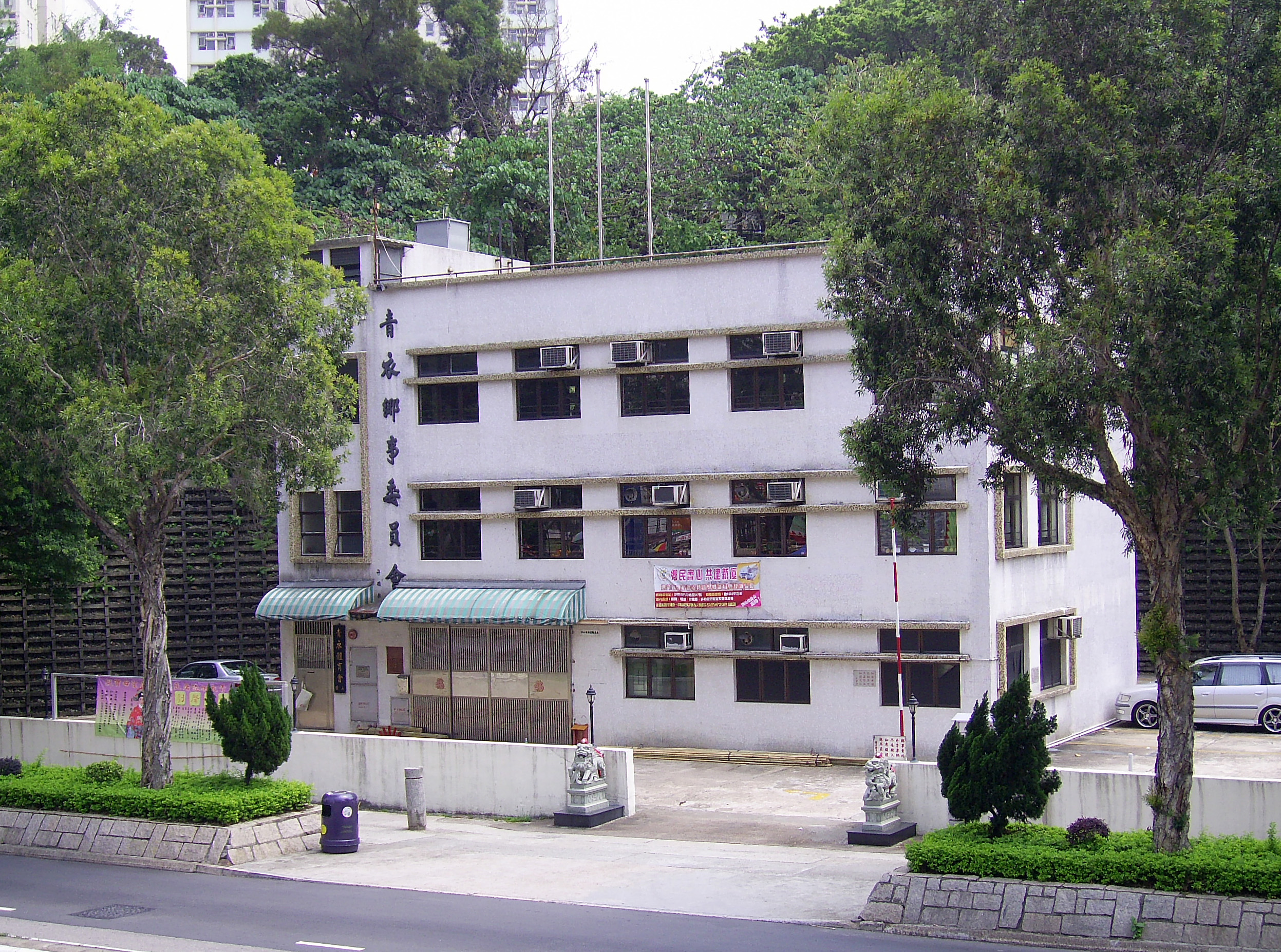 中文（香港）: 青衣鄉事委員會